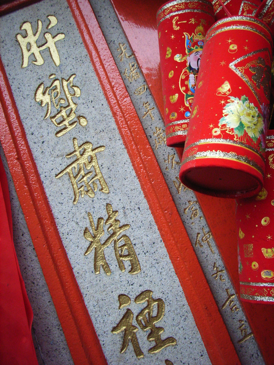 蠔涌車公廟 又名 車公古廟，是一座zh:中國特色的古舊zh:廟宇，此zh:車公廟有300多年歷史。 蠔涌車公廟位於zh:香港zh:西貢區zh:蠔涌，蠔涌河及zh:蠔涌路以北，蠔涌新村以東，亞洲電視zh:建築物以東。 蠔涌車公廟主要供奉之zh:神仙是zh:車公，它是zh:宋朝的大將軍，曾經平定zh:華南某場zh:戰爭zh:叛亂，道教人士奉之為神靈。